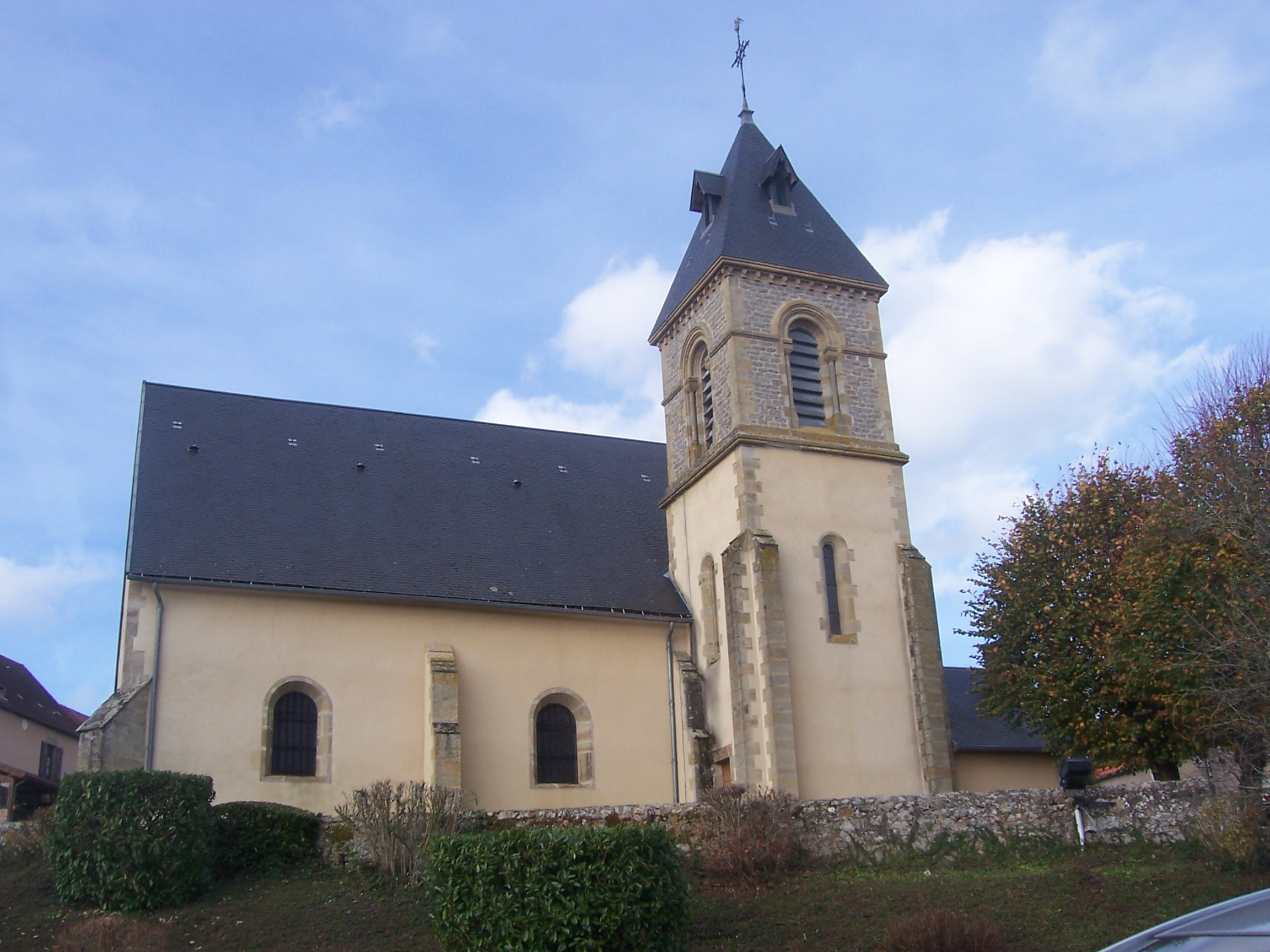 Eglise de Reclesne